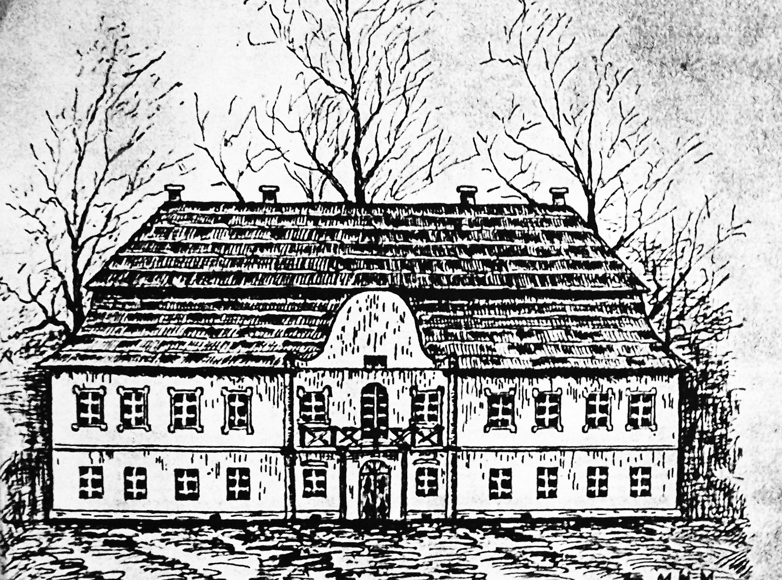 Pałac we Włodowicach, stan z 1850 r., autor i pochodzenie szkicu nieznane.